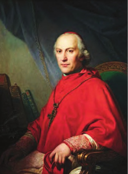 Kardinal Ercole Consalvi (1757-1824), päpstlicher Legat